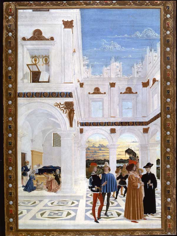 Perugino (attr.), miracolo del bambino nato morto, da storie di san bernardino